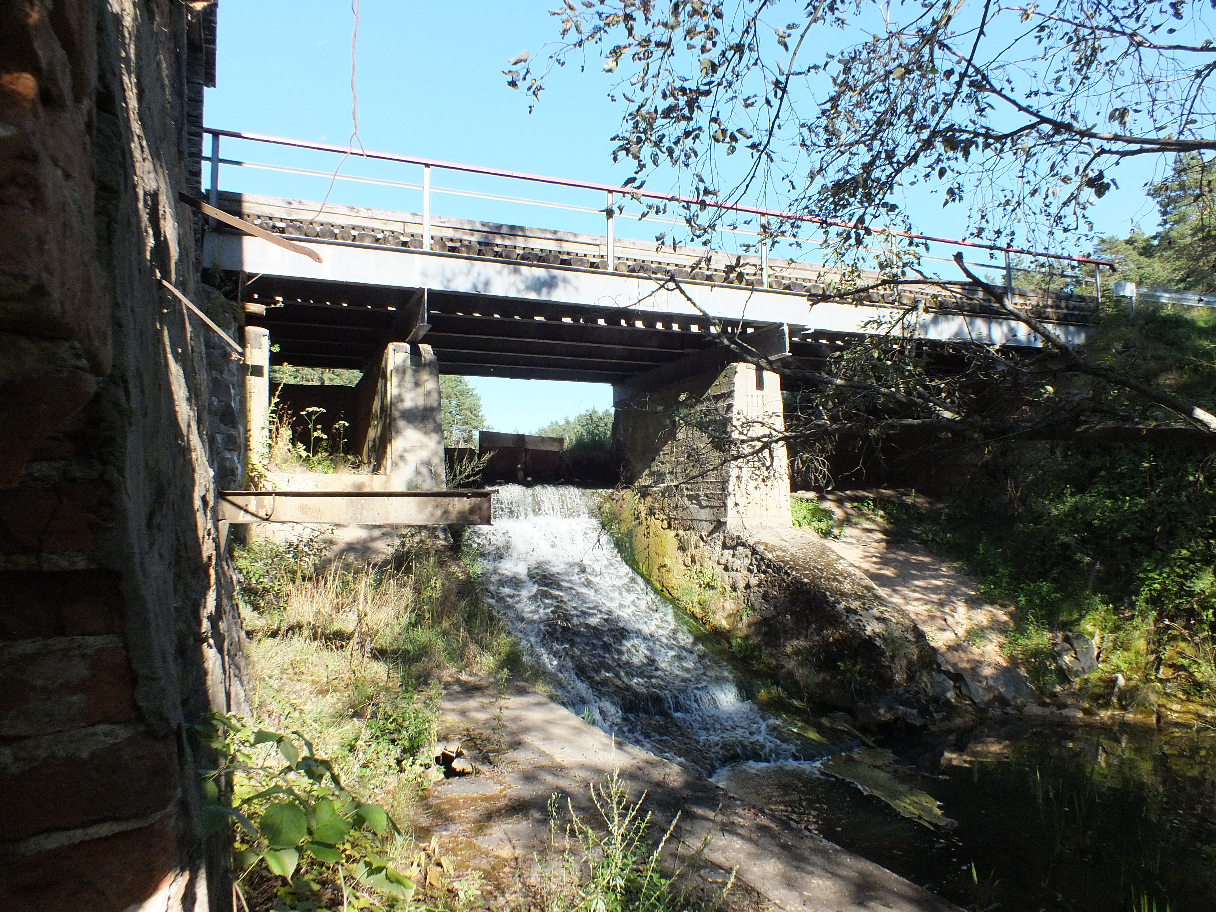 Judinio malūno užtvanka